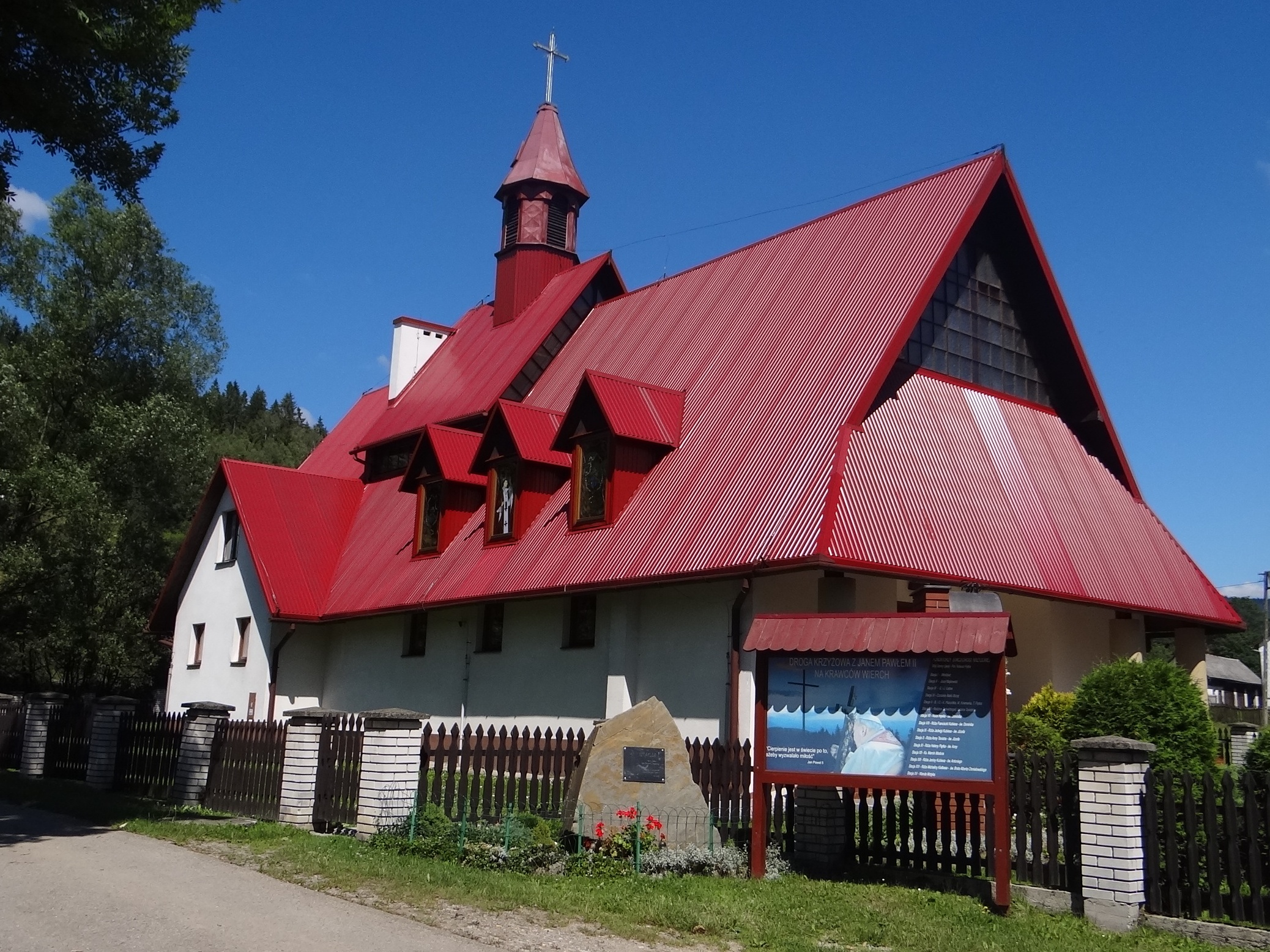 Kościół w Glince